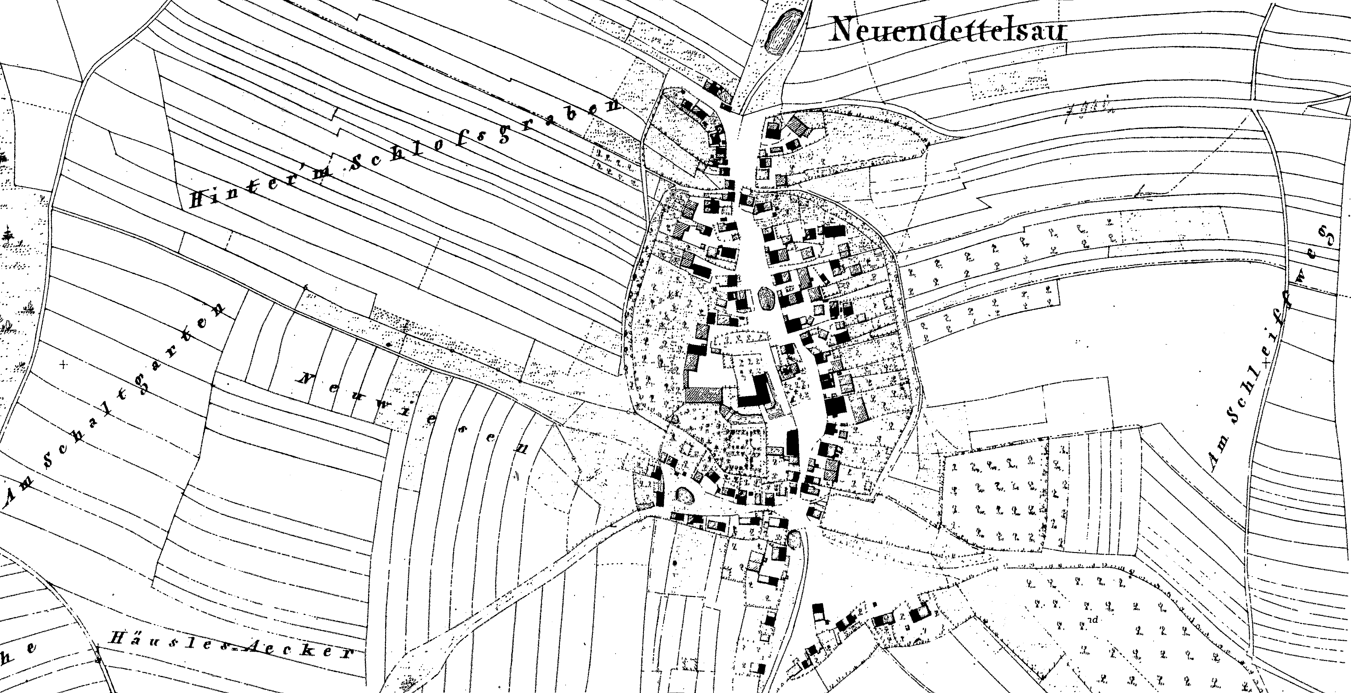 Ausschnitt aus dem Extraeditionsplan von 1835 mit dem Dorf Neuendettelsau und der angrenzenden Flur